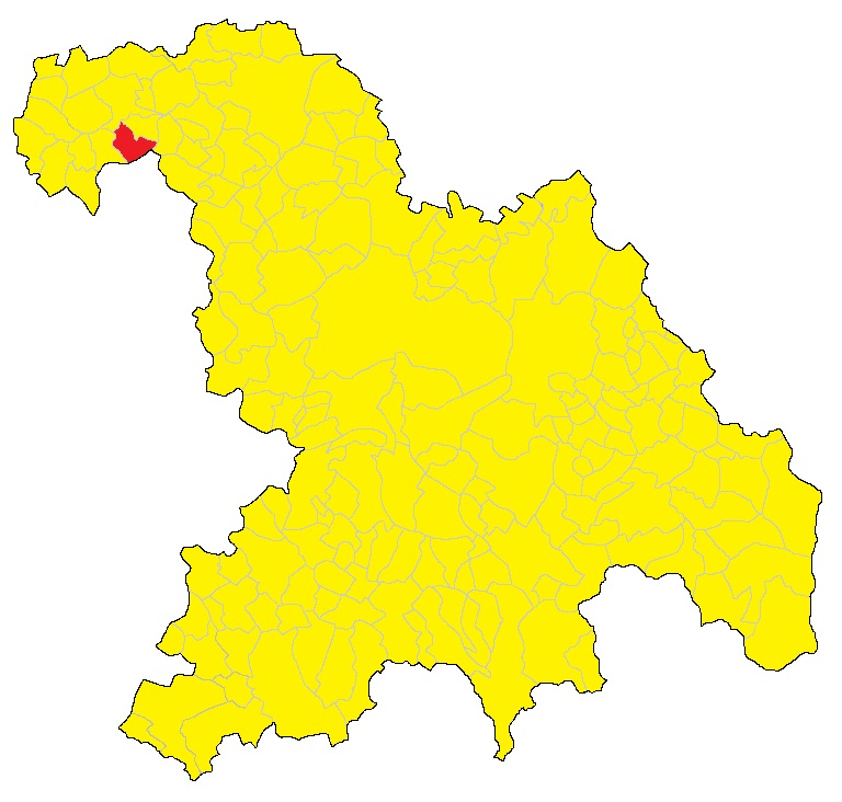 Mappa del comune di Ponzano Monferrato (AL)